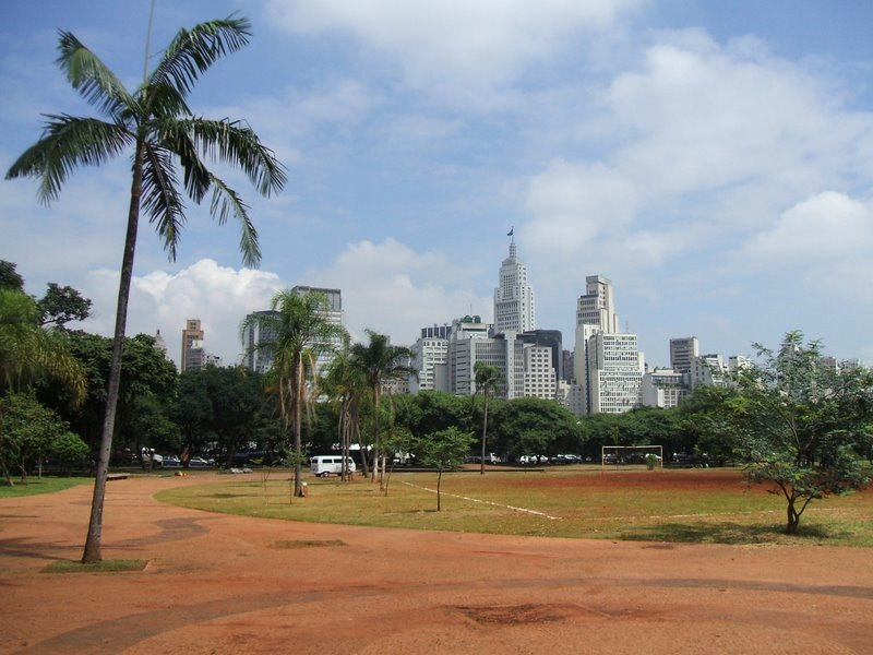 Centro da cidade de São Paulo, visto a partir do Parque Dom Pedro II. Em destaque, no skyline ao fundo, o Edifício do Banespa.